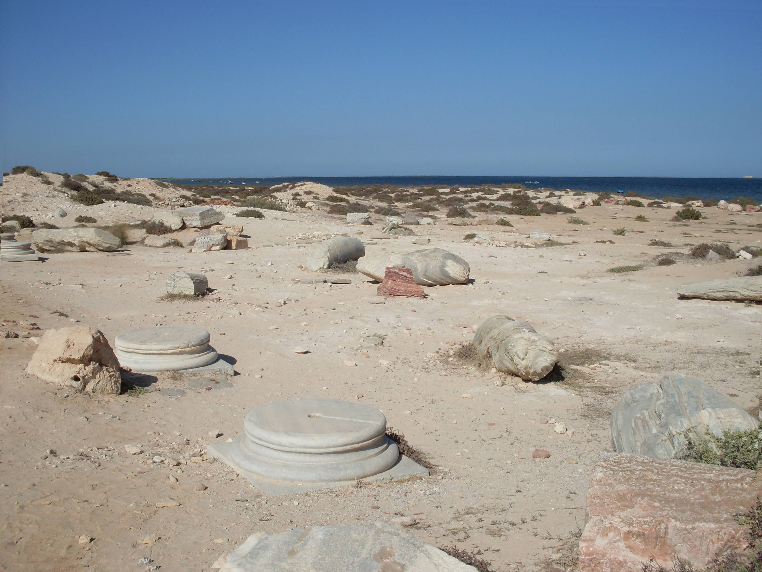 Site Archéologique Meninx Djerba